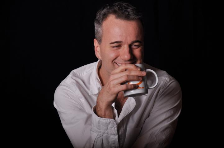 Profilbild Jochen Sachse